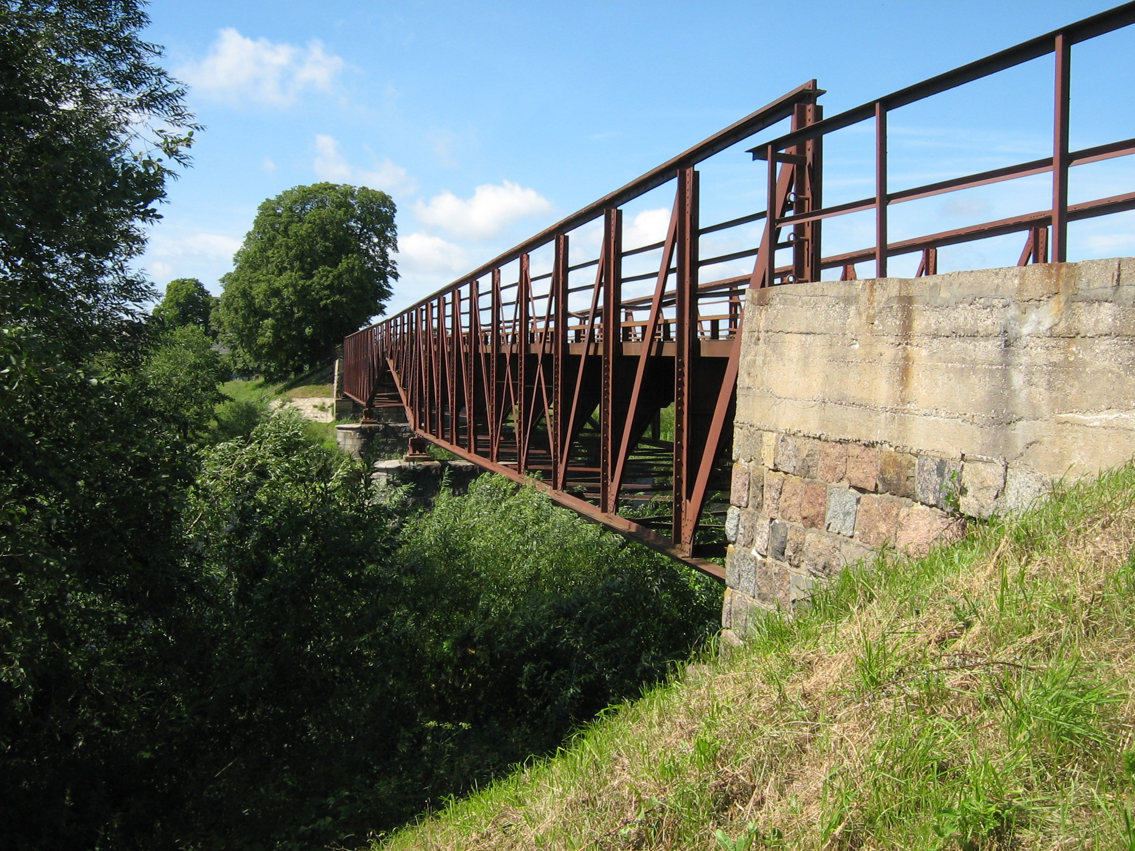 Sakūčių tiltas per Miniją.